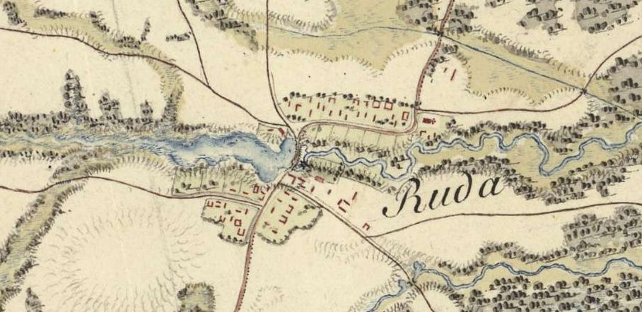 Ruda na mapie Galicji Zachodniej (Josephinische Landesaufnahme 1801-1804)